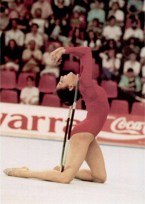 La gimnasta rítmica española Ada Liberio en la VI Copa Internacional de Gimnasia Rítmica Ciudad de Barcelona en 1990.